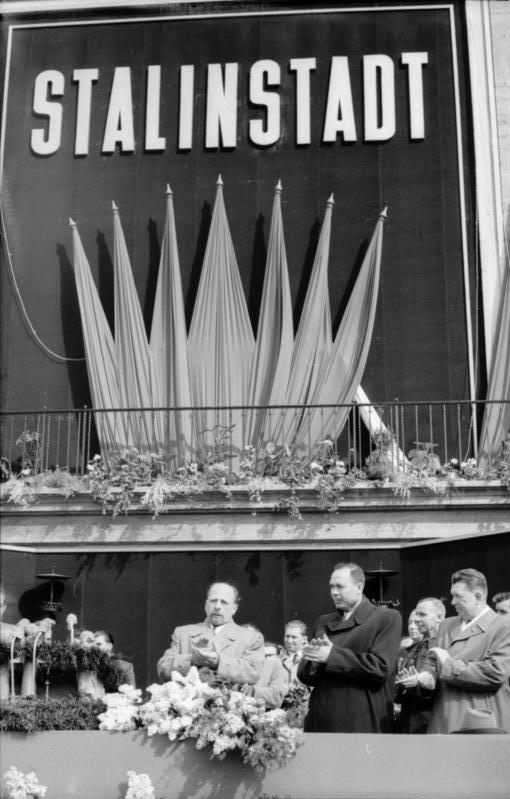 Zentralbild / Sturm / 7.5.1953 / Der Name "Stalinstadt" verliehen Der ersten sozialistischen Stadt beim Eisenhüttenkombinat Ost wurde am 7. Mai 1953 der Ehrenname "Stalinstadt" verliehen. An den Feierlichkeiten nahmen Vertreter der Regierung, des Diplomatischen Corps und Delegationen aus der Sowjetunion und den Volksdemokratien teil. UBz: Nach der Umbenennung. V.l.n.r.: Walter Ulbricht, der Leiter der Sowjetischen Delegation Jefanow, daneben der sowjetische Botschafter Iljitschow Abgebildete Personen: Ulbricht, Walter: Staatsratsvorsitzender, Erster Sekretär des Zentralkomitees (ZK) der SED, Vorsitzender des Nationalen Verteidigungsrates, DDR Iljitschow, Iwan I.: Botschafter in der DDR, Sowjetunion